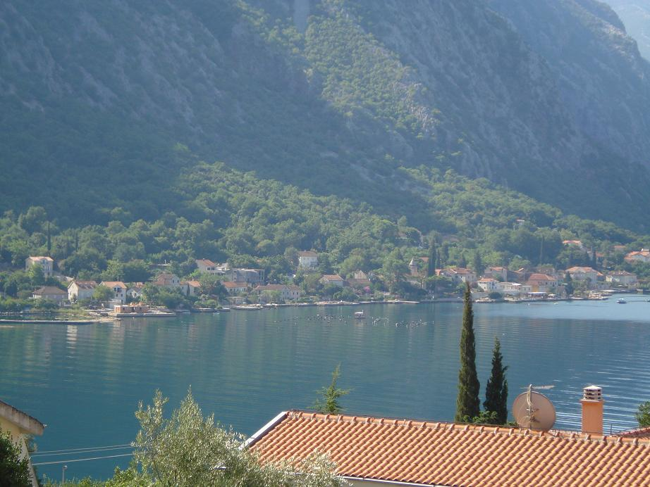 Ljuta